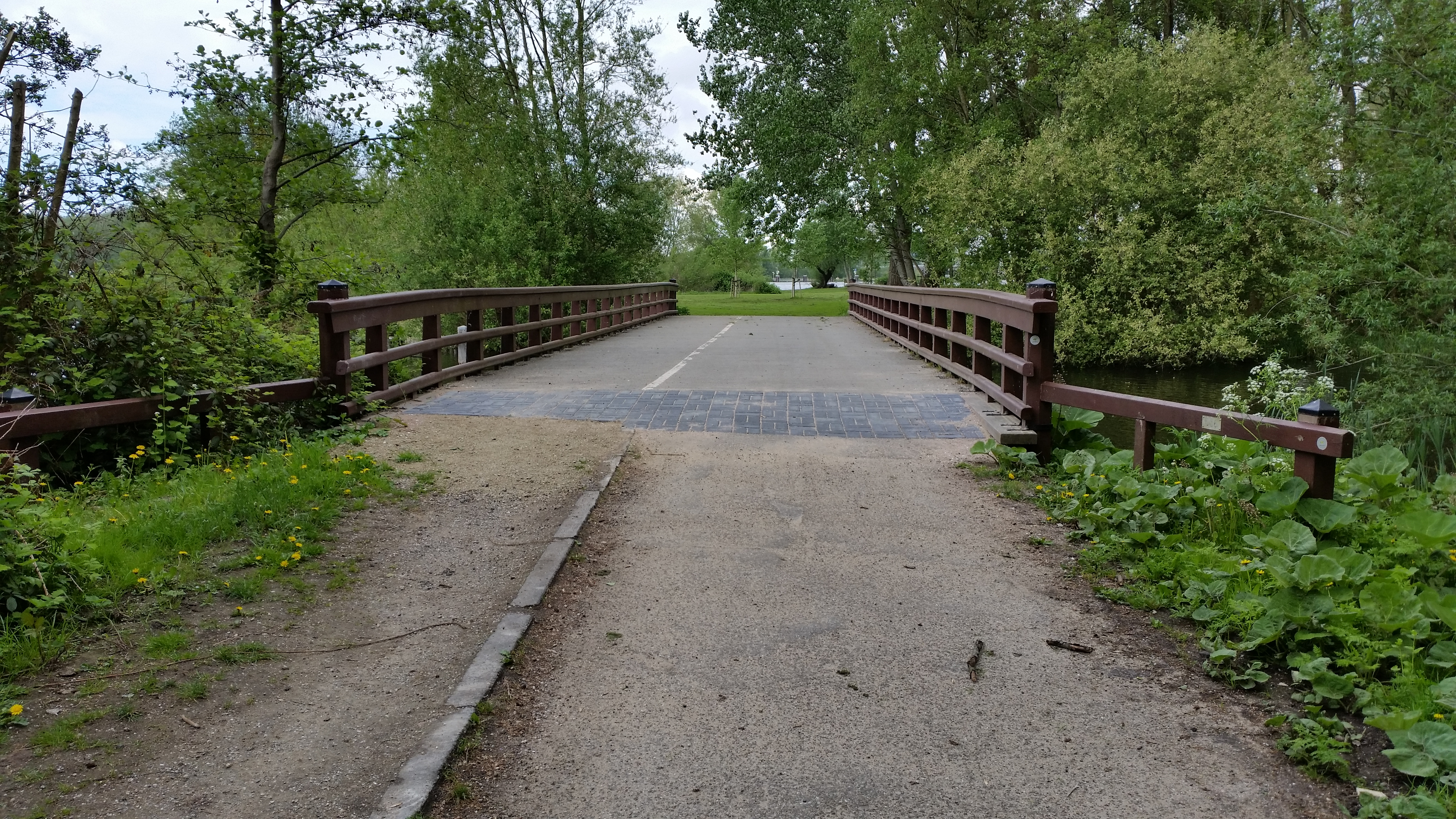 Overzicht over Brug 506 (in Amsterdam)